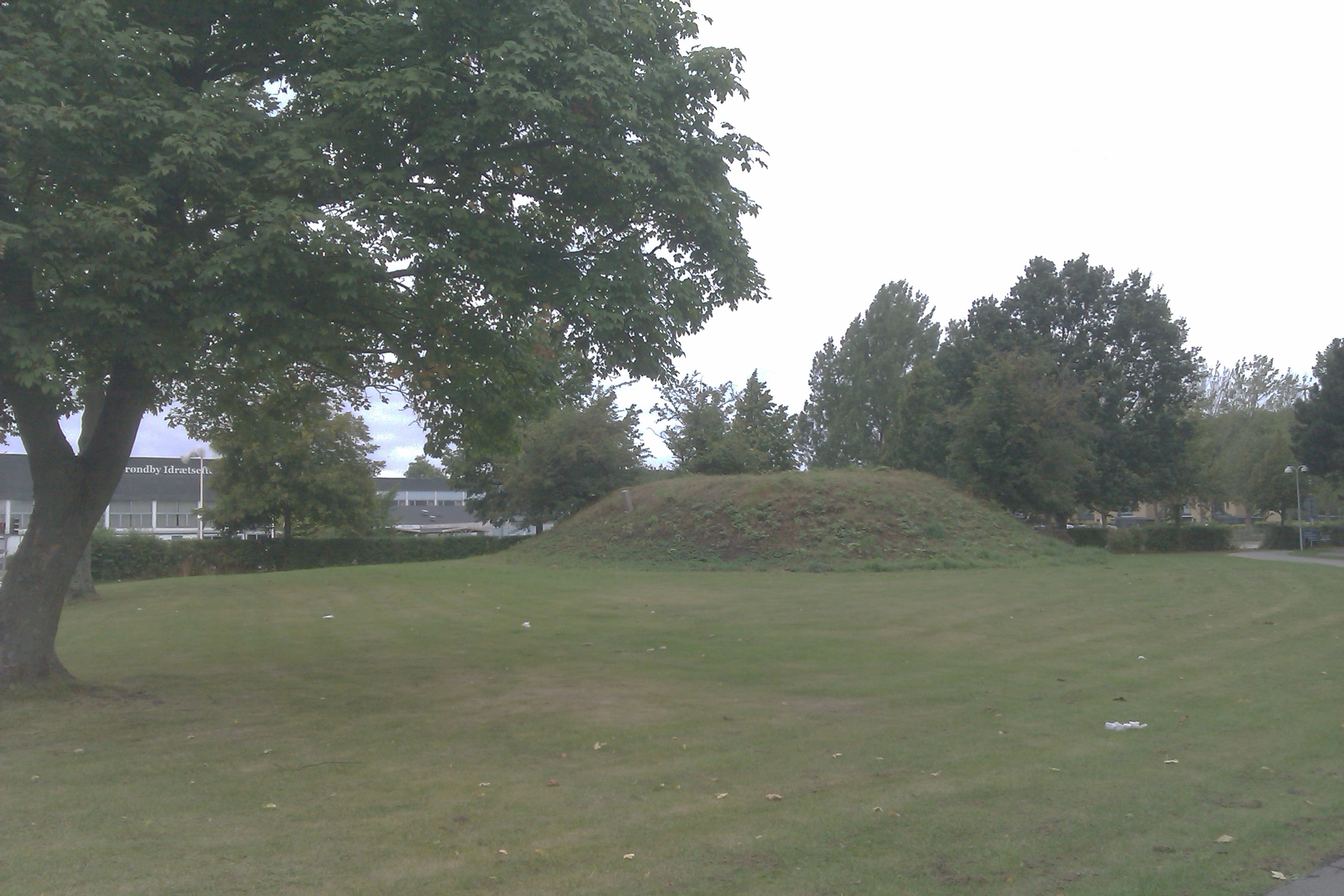 Højen Tornhøj ved Brøndby Stadion